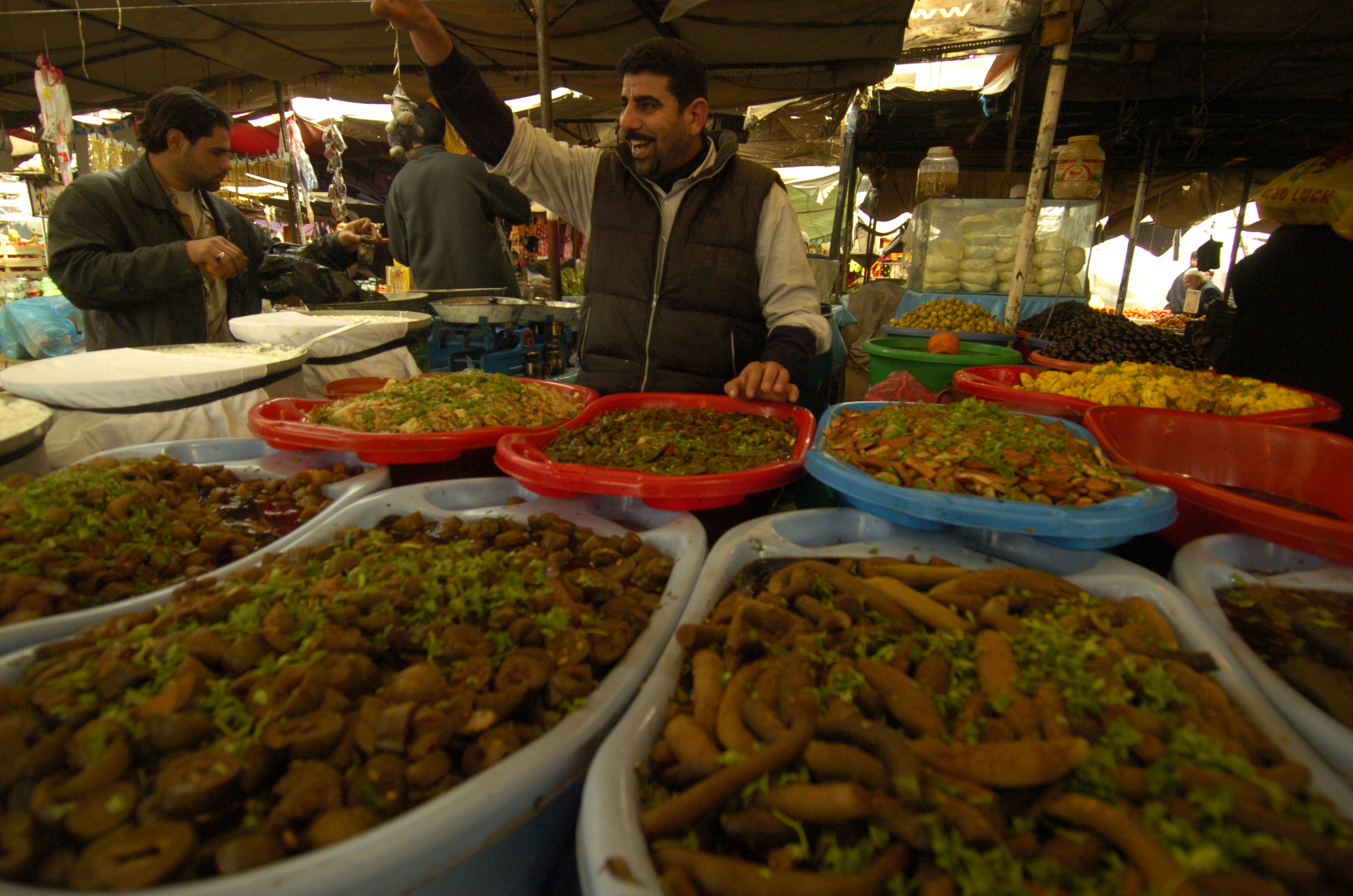 A vendor at a market in Baghdad, Iraq